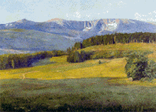 Georg Wichmann Riesengebirgskamm im Frühsommer